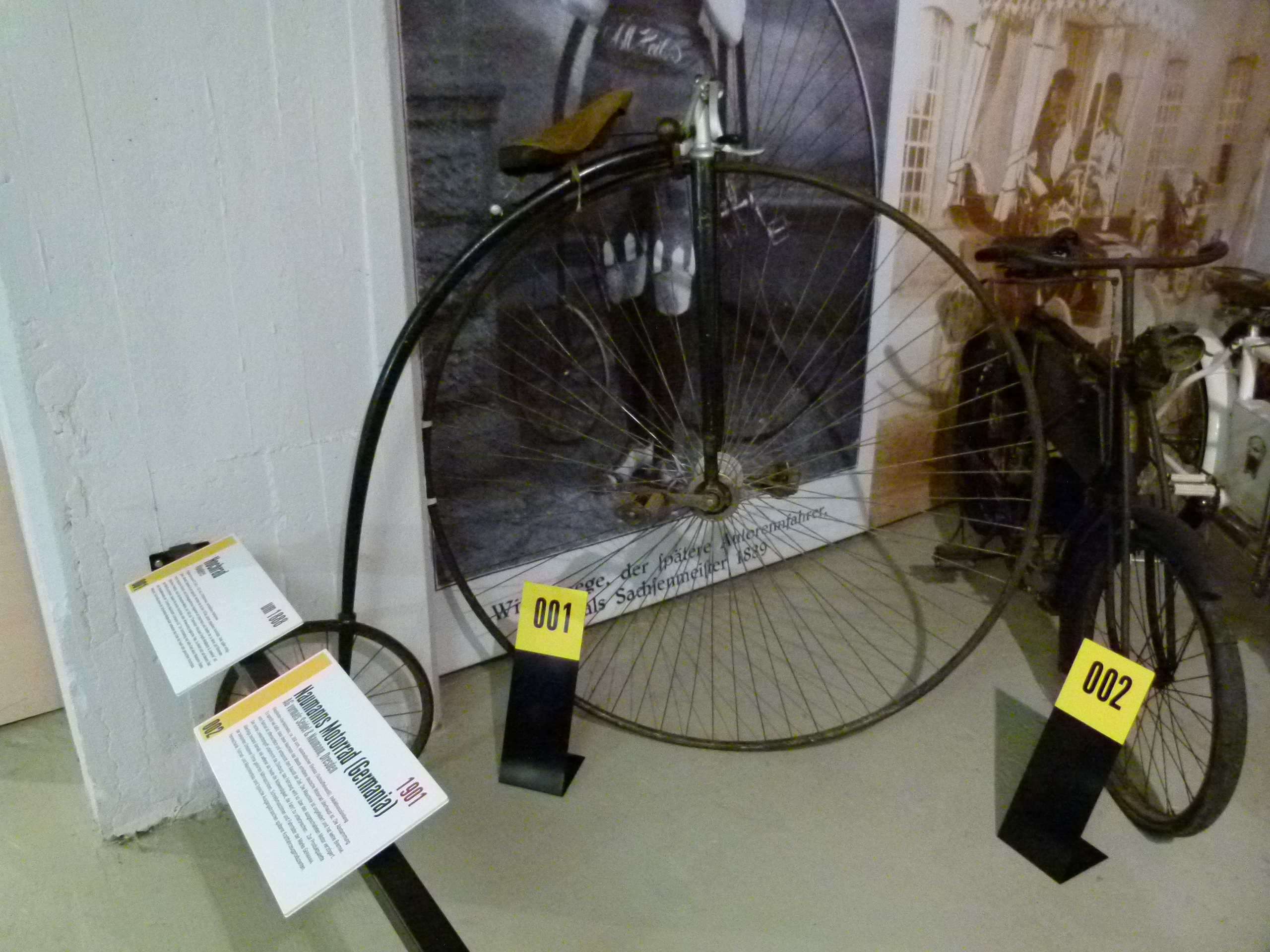 Hochrad Wanderer